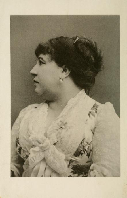 Marie Colombier in Affaire Marie Colombier - Sarah Bernhardt, pièces à conviction. Paris, 1884. Phototypie E. Bernard & Cie